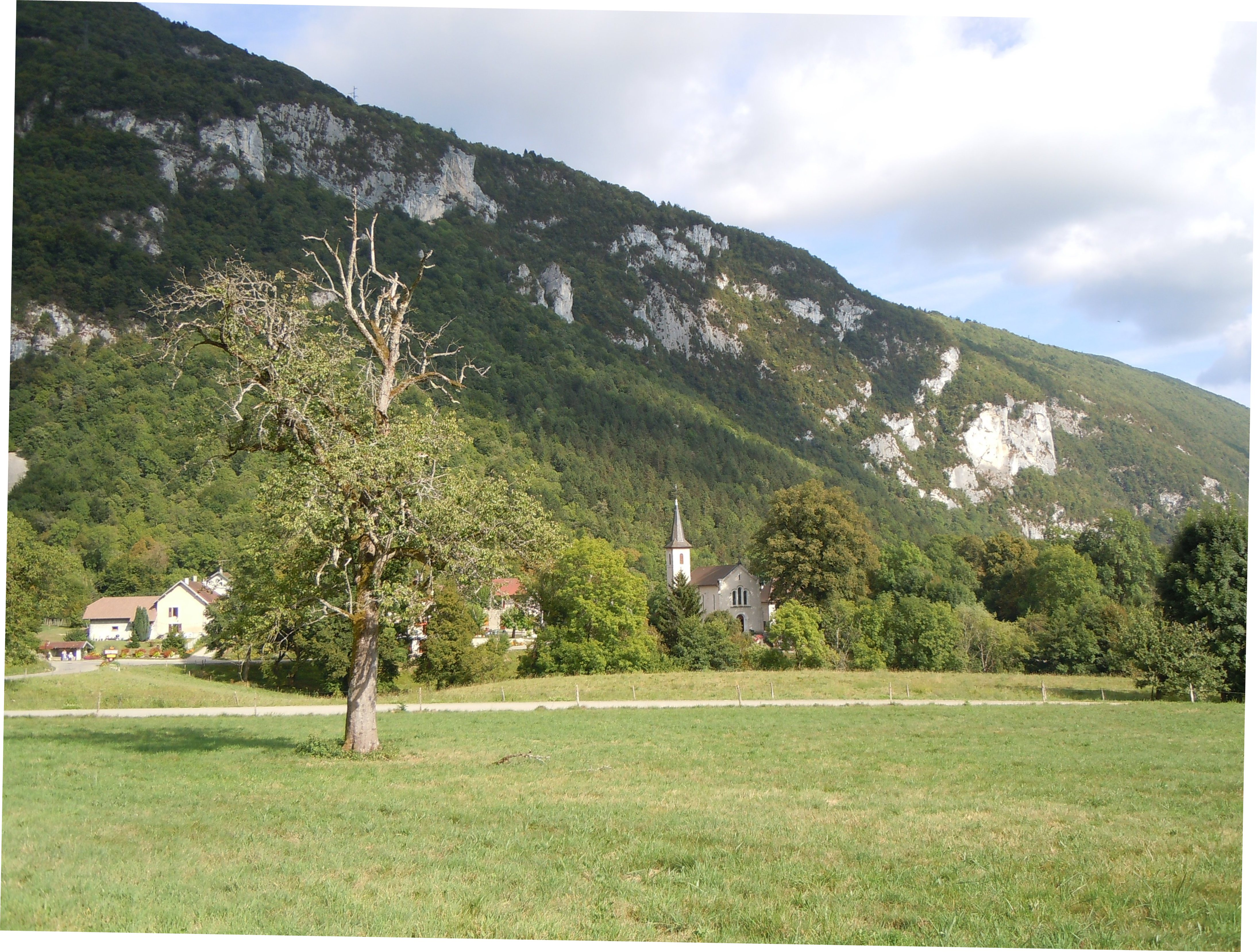 Nances - Vue Générale - Savoie- France